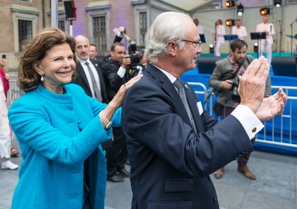 Drottning Silvia firar Carl XVI Gustafs 40 år på tronen på inre borggården på Stockholms slott den 15 september 2013.